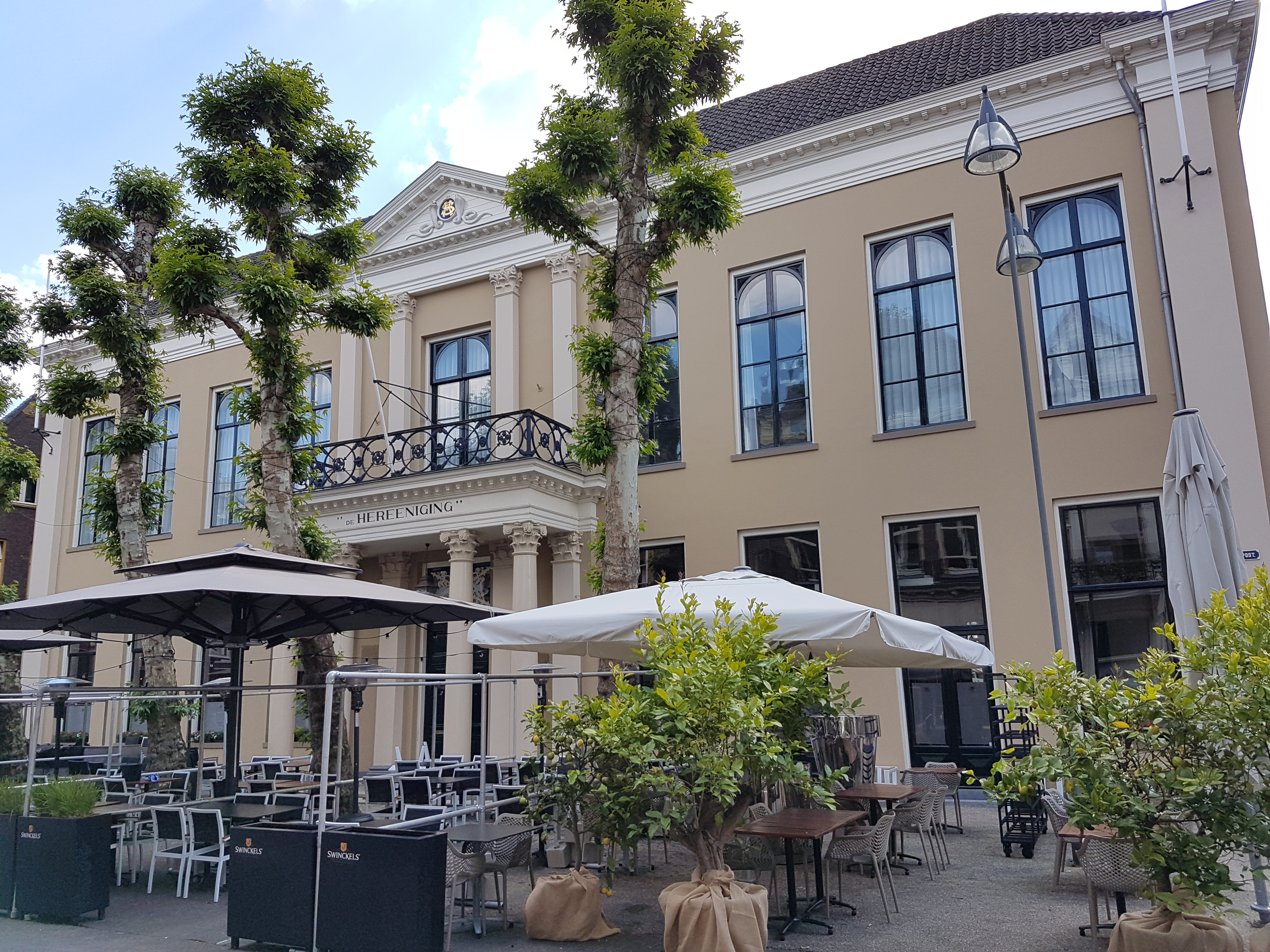 In 1836 gebouwd als schoolgebouw voor het Athenaeum Illustre op de locatie van het Stadswijnhuis De Steerne. Na sluiting van de school en een ruil met de gemeente kwam het pand in handen van van Sociëteit de Hereeniging.